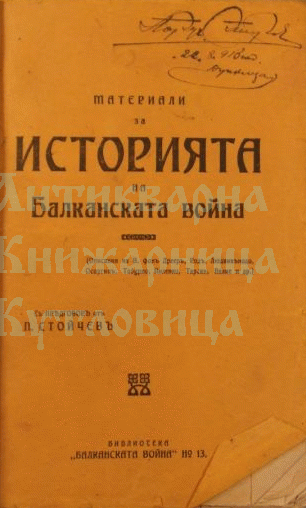 Материали за историята на Балканската война. — Шумен: Ив. Лесичков, 1913. — 491 с.